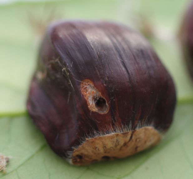 Angebohrte Edelkastanie (Castanea sativa)